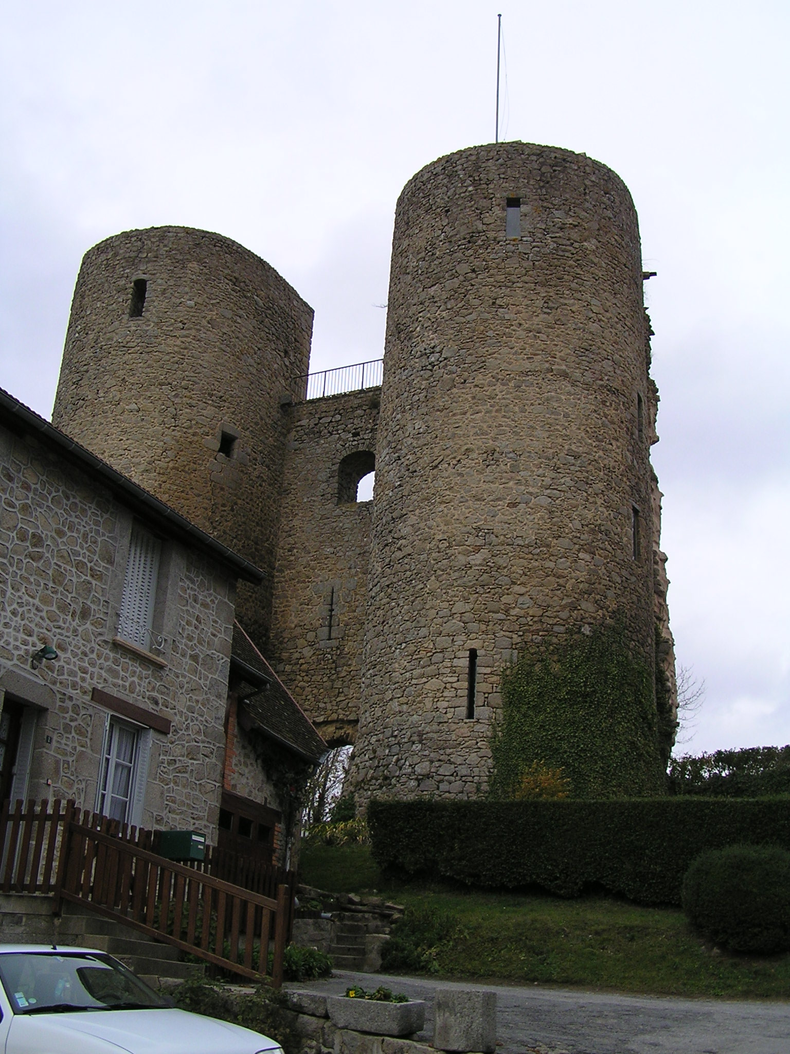 tours de Crocq